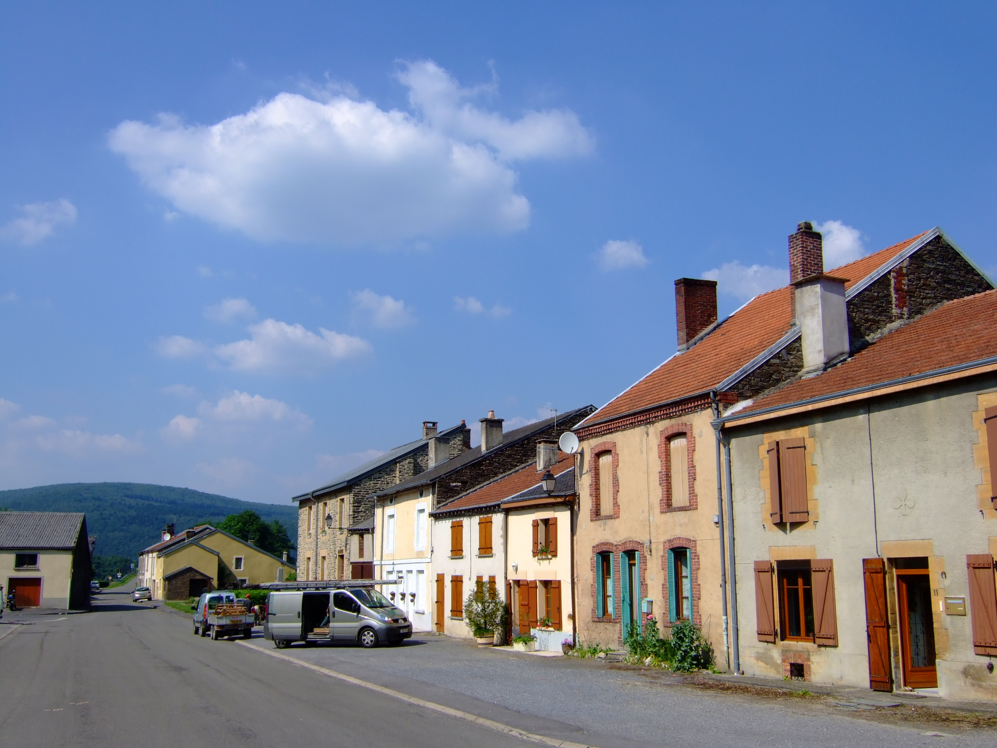 Haulmé (Ardennes)